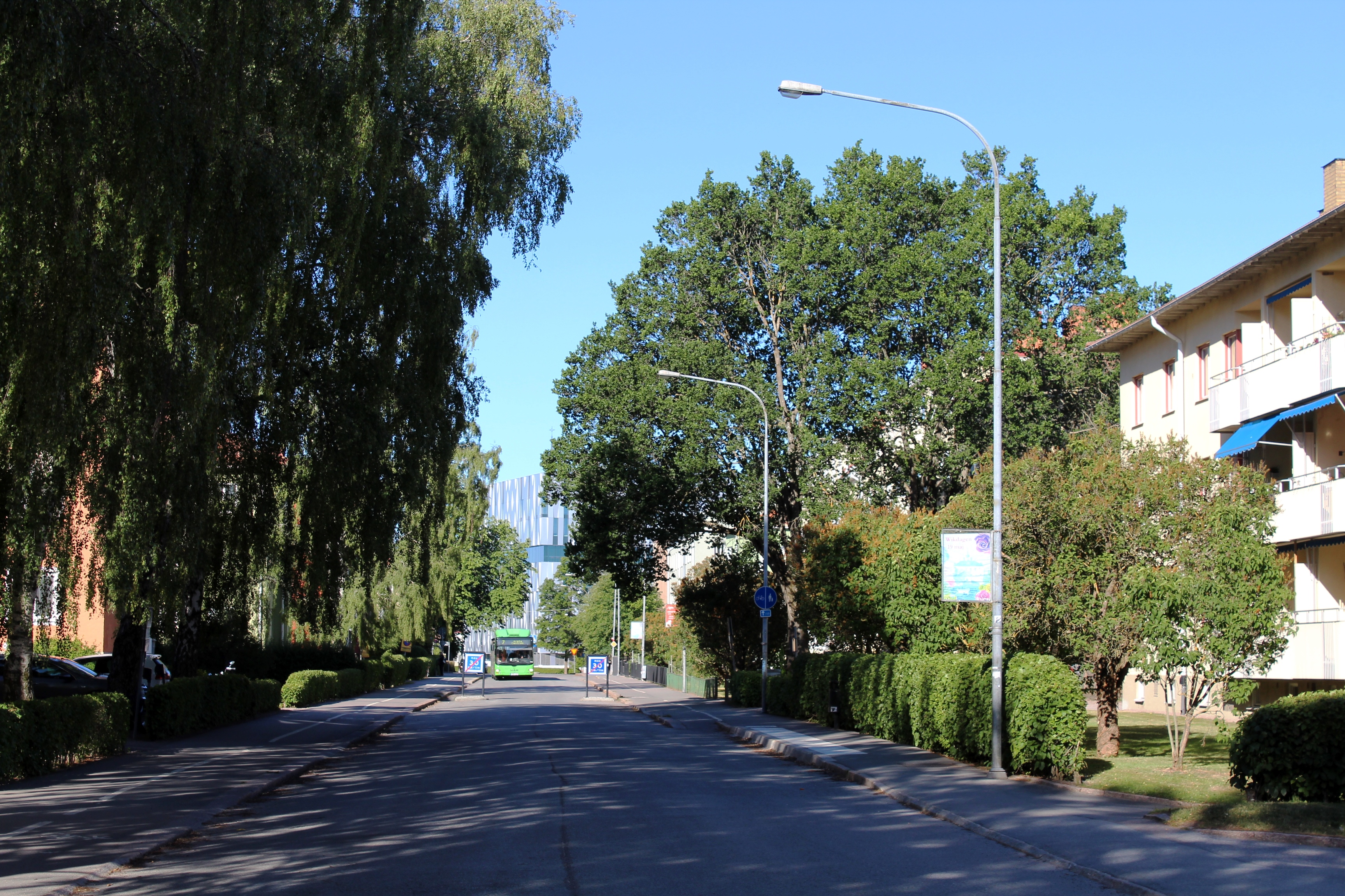 Hjalmar Brantingsgatan, Uppsala, vy mot stadens centrum med Uppsala Konsert & Kongress i bakgrunden